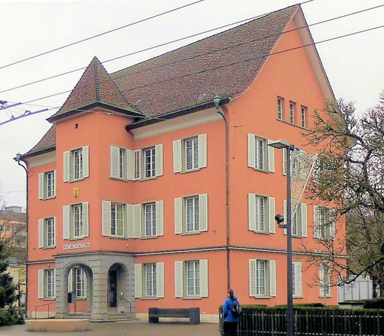 Gemeindehaus in Neuhausen am Rheinfall, Kanton Schaffhausen, Schweiz